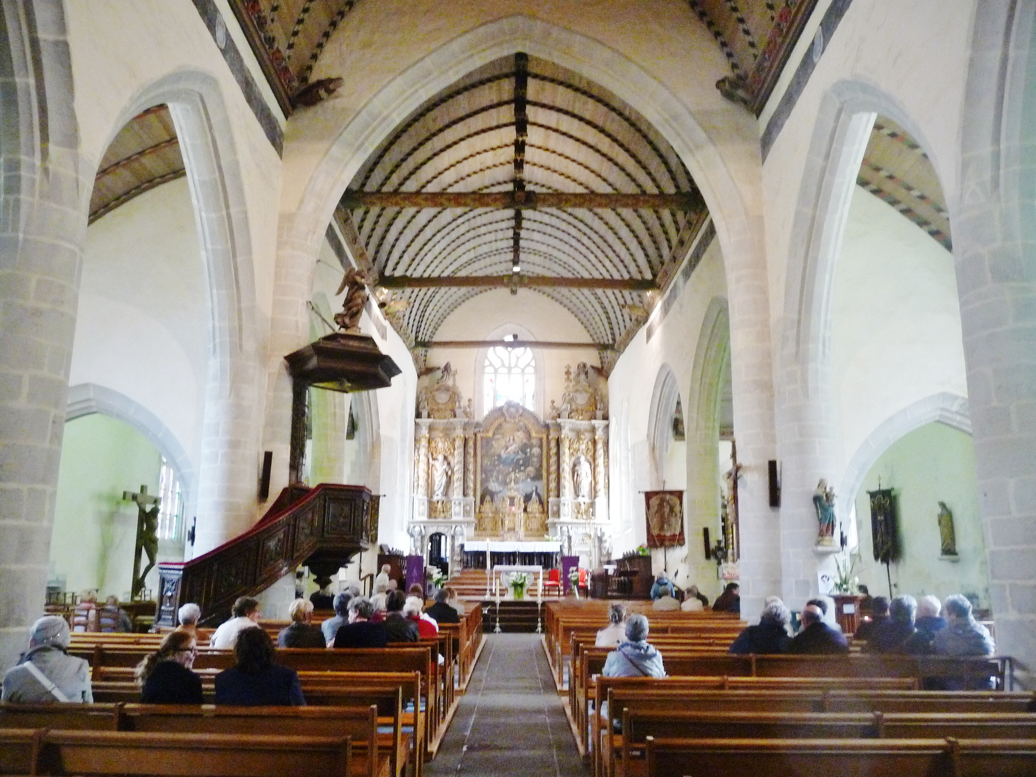 Roscoff : vue intérieure de l'église paroissiale